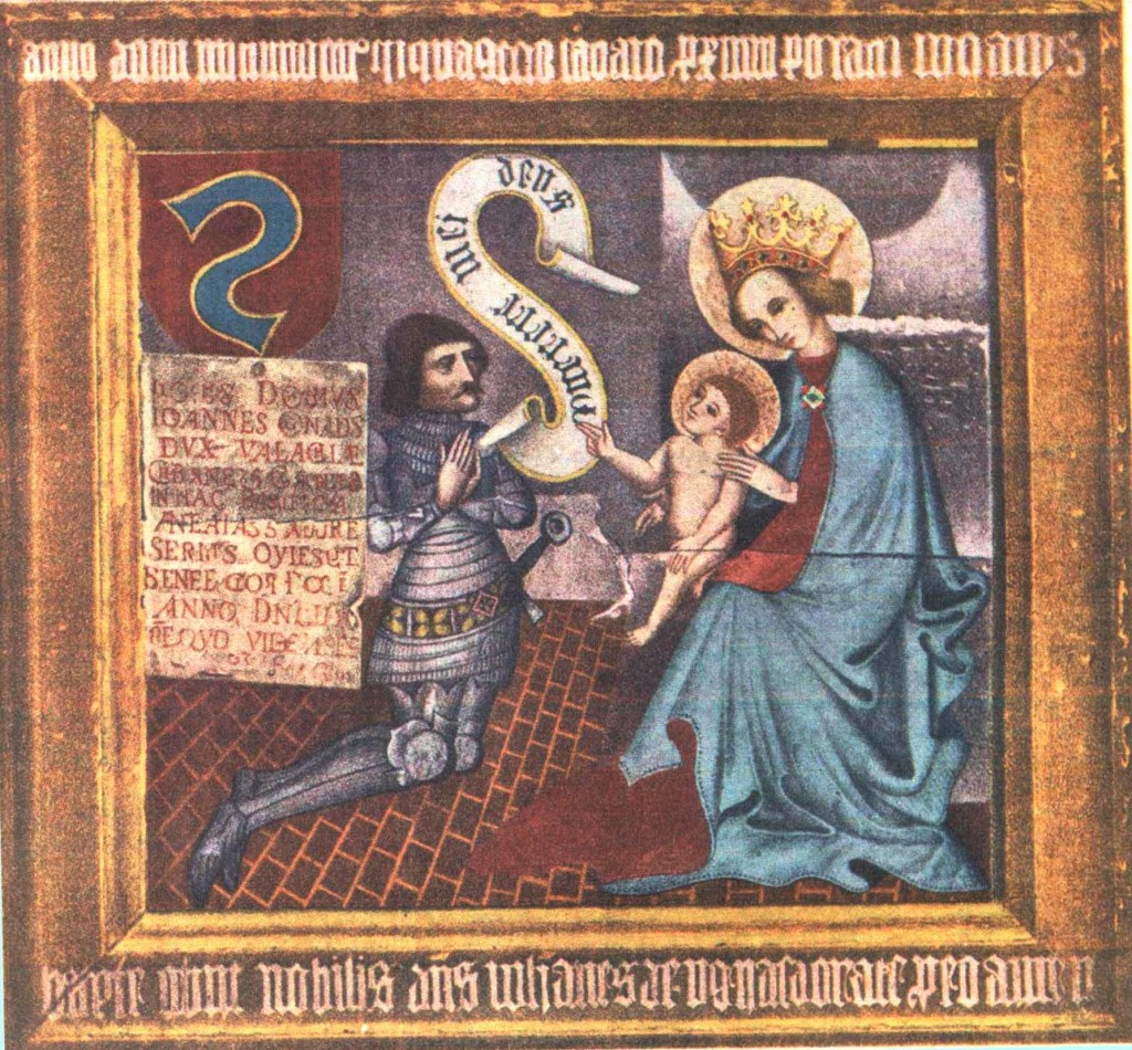 Reproducerea din 1689 a icoanei reprezentând pe Ioan de Onads, ducele Vlahiei